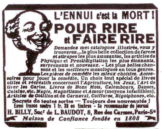 Publicité avec notamment bigotphones.